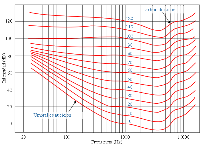 Modificación por traducción al castellano.